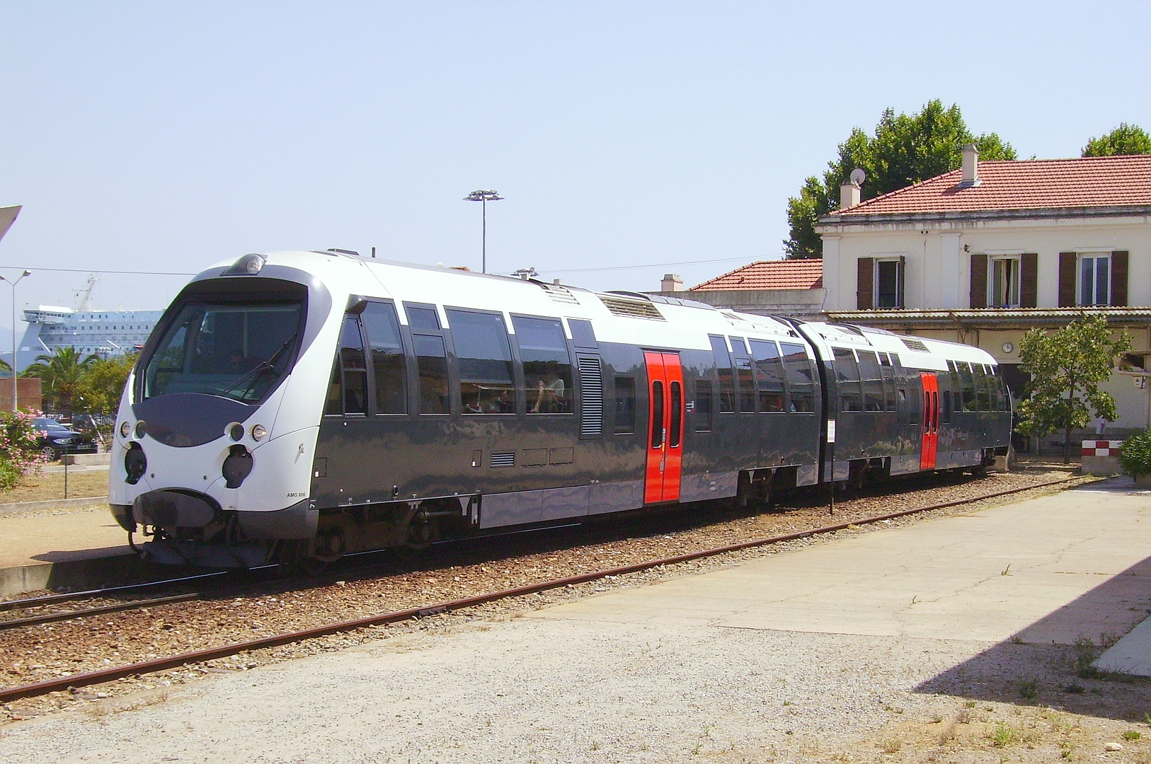 En gare d'Ajaccio, la rame AMG 800 - train n° 26 attend le départ pour Bastia le 15/07/09.